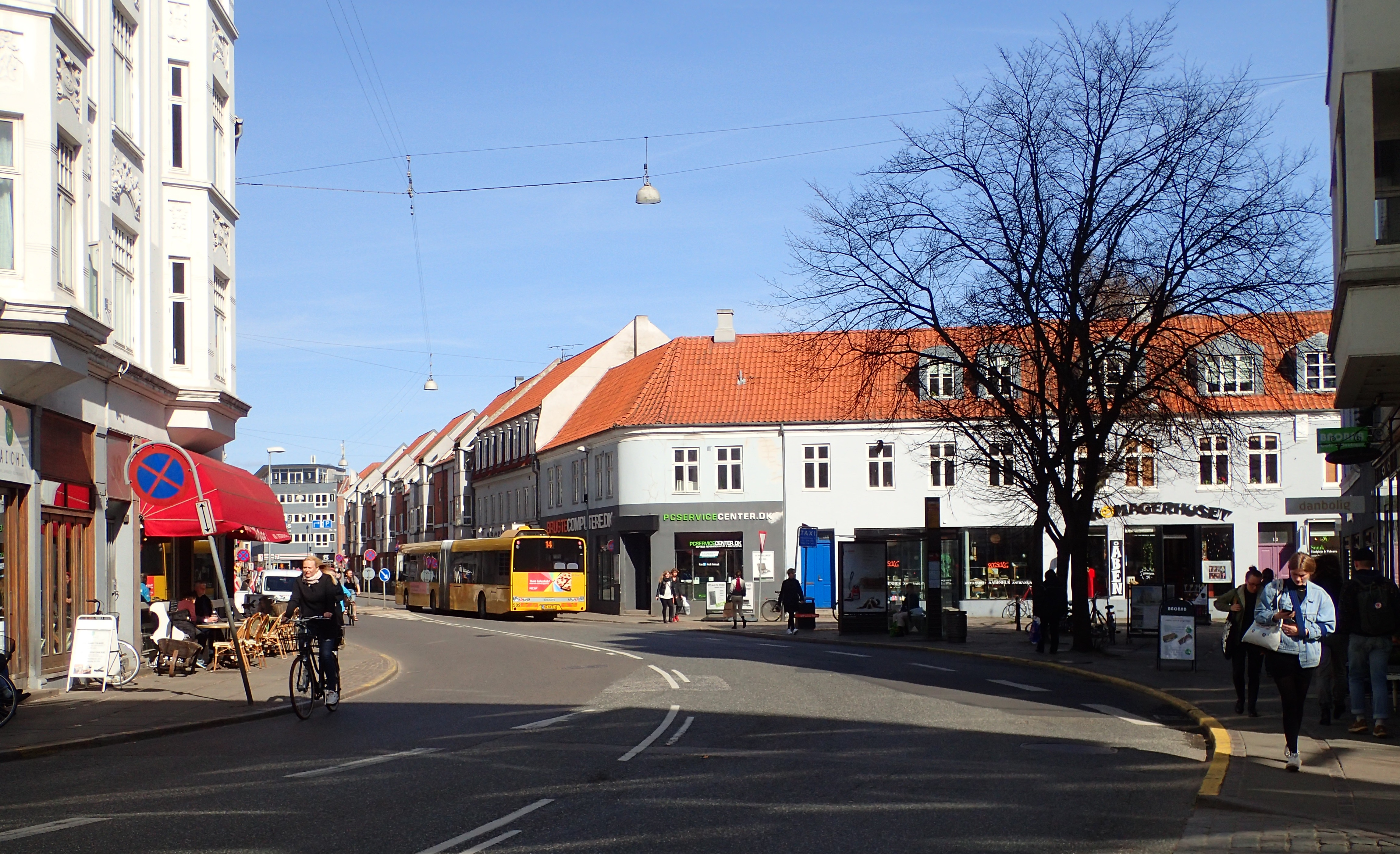 Et kik ned af Nørregade tidlig April. Beskåret original.